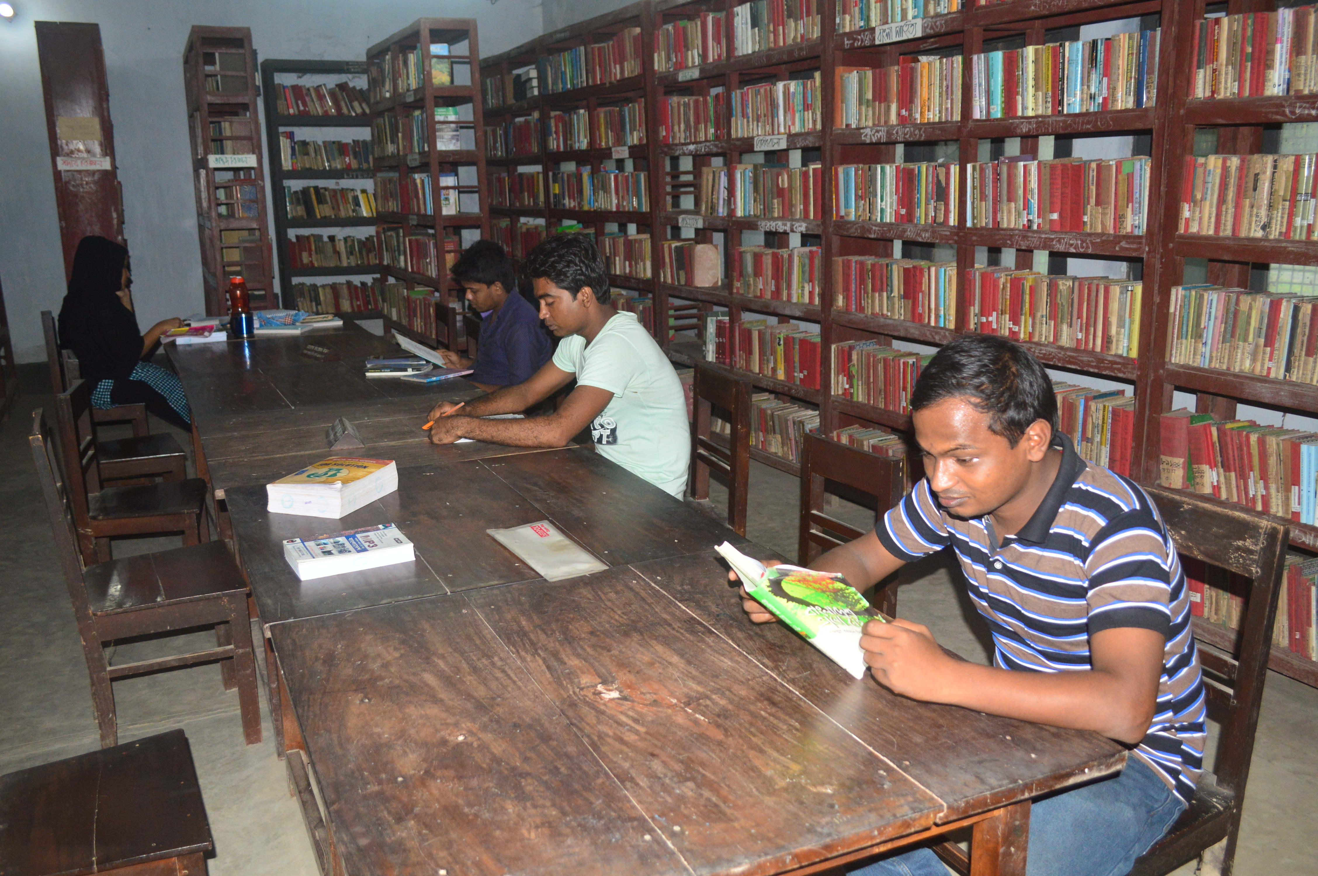 যশোর ইনস্টিটিউট পাবলিক লাইব্রেরী